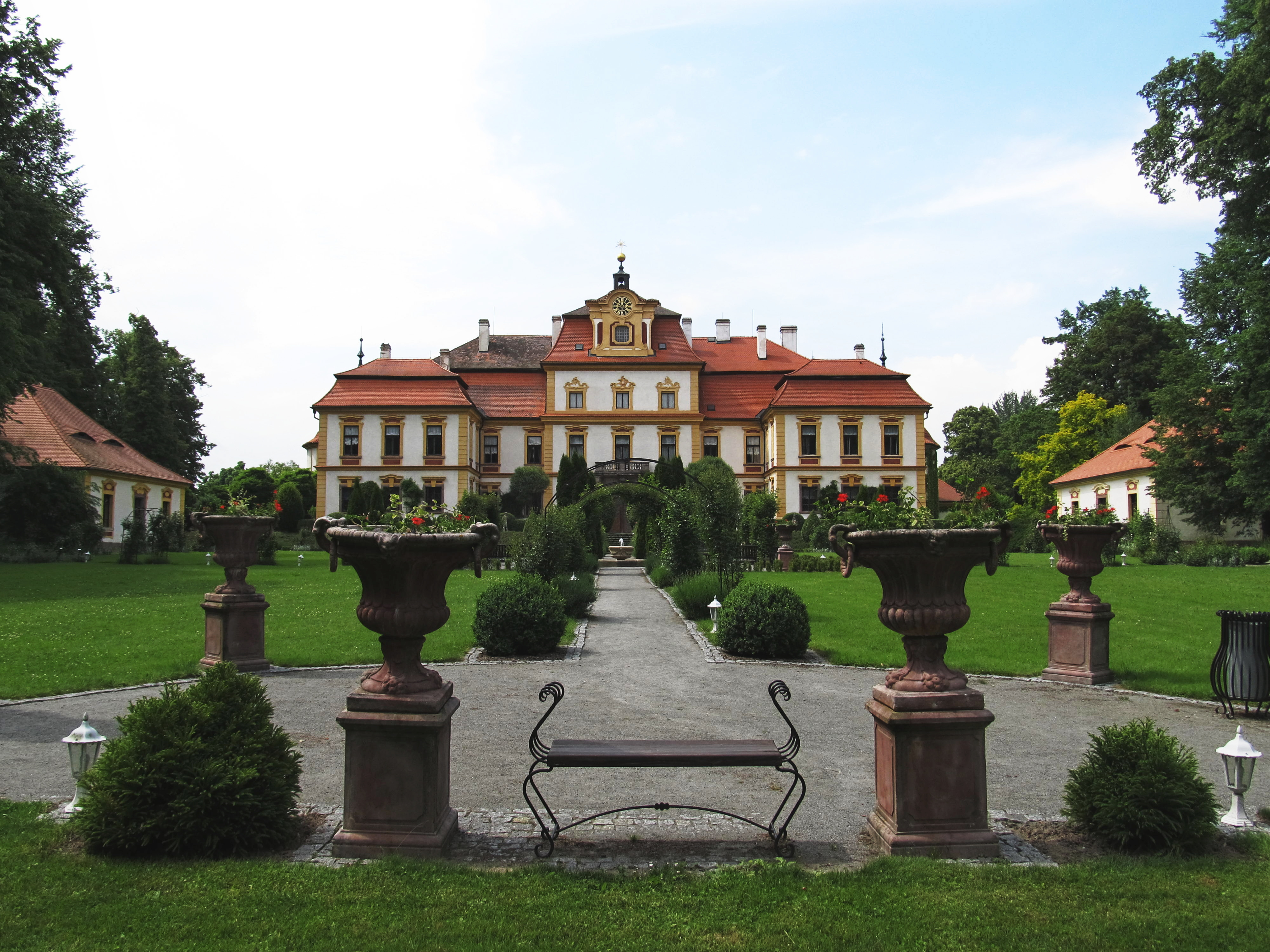 Zahradní průčelí zámku